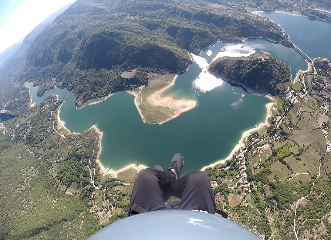 vista dall'alto del lago del turano e castel di tora